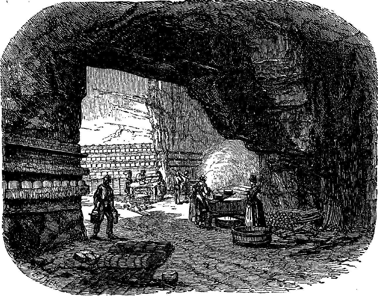 extrait de La France illustrée, géographie, histoire, administration, statistique, etc., tome I, par V.-A. Malte-Brun.